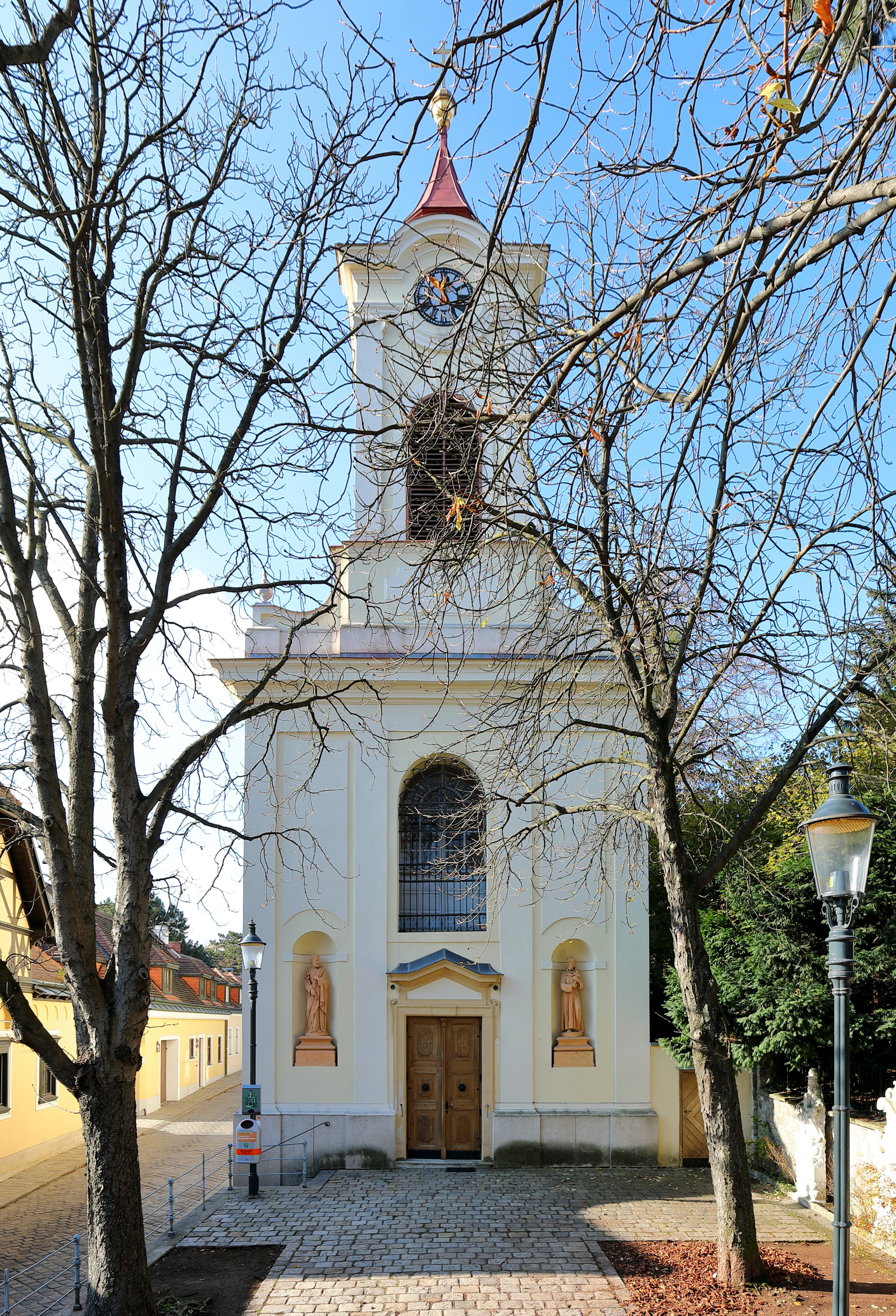 Ostansicht der Ägydiuskirche in Pötzleinsdorf, ein Stadtteil im 18. Wiener Gemeindebezirk Währing.Nachdem der Ort 1750 größtenteils abbrannte, wurde auch die Kirche Opfer der Flammen und 1752 erfolgte ein Neubau an neuer Stelle. Diese spätbarocke, einschiffige Kirche erhielt 1784 den Staus einer Pfarrkirche und verlor ihn wieder am 1. September 1964, als die neue Pötzleinsdorfer Pfarrkirche eingeweiht wurde. Die Statuen in den seitlichen Rundbogennischen der Eingangsfassade stellen den hl. Josef und den hl. Franz von Assisi dar.